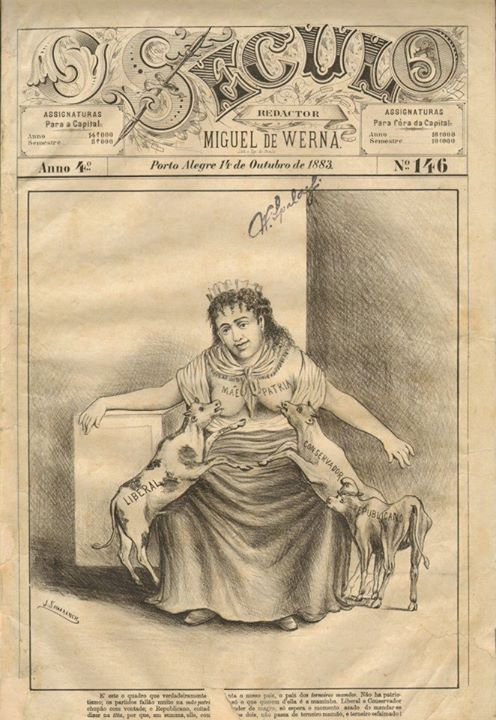 Página de O Século, ilustração de Joaquim Samaranch